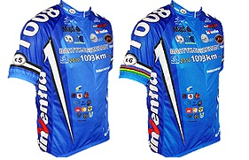 Stroje BBT